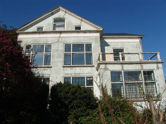 Huize Ehrenfest in Leiden